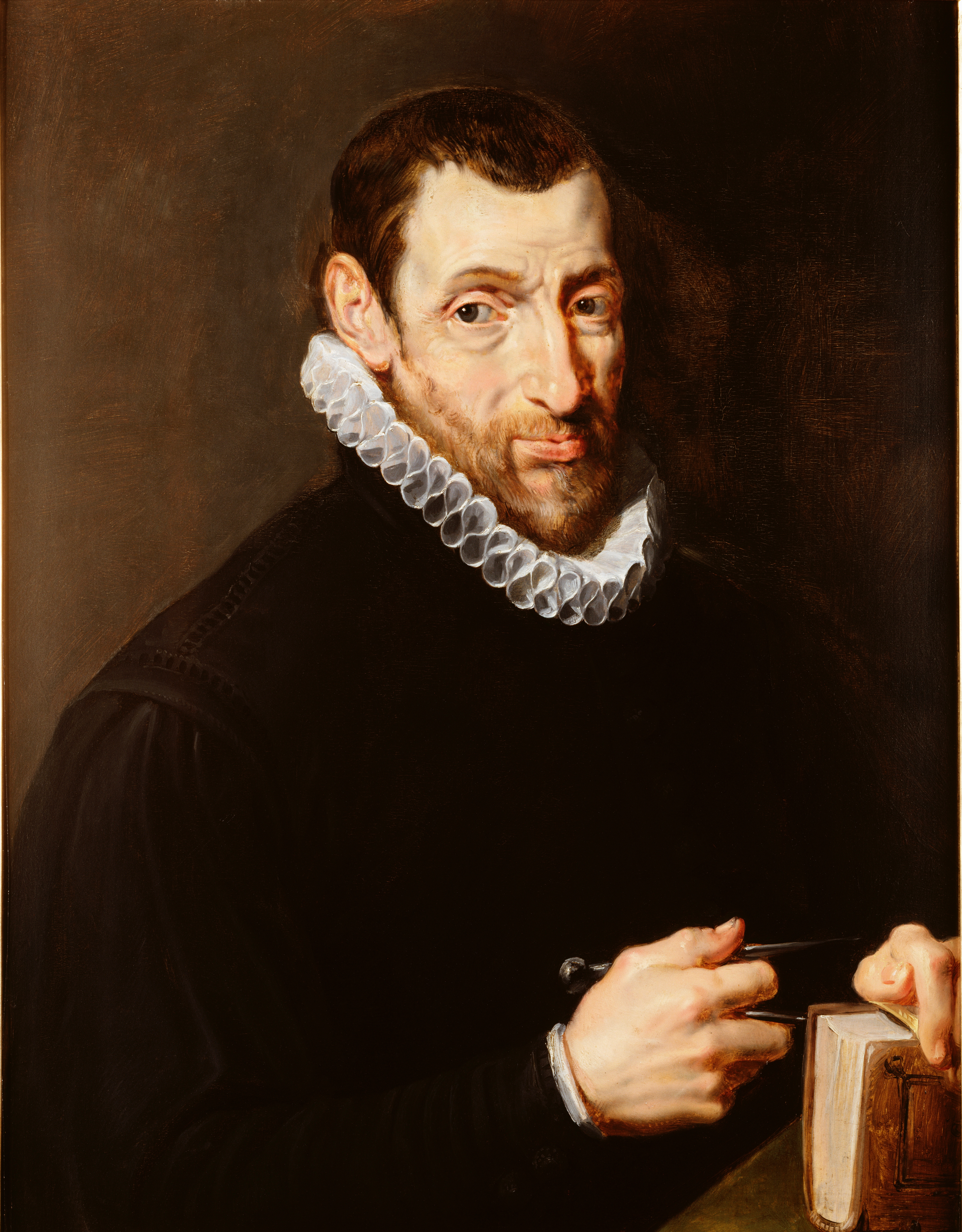 schilderij ( Peter Paul Rubens ( Museum Plantin-Moretus